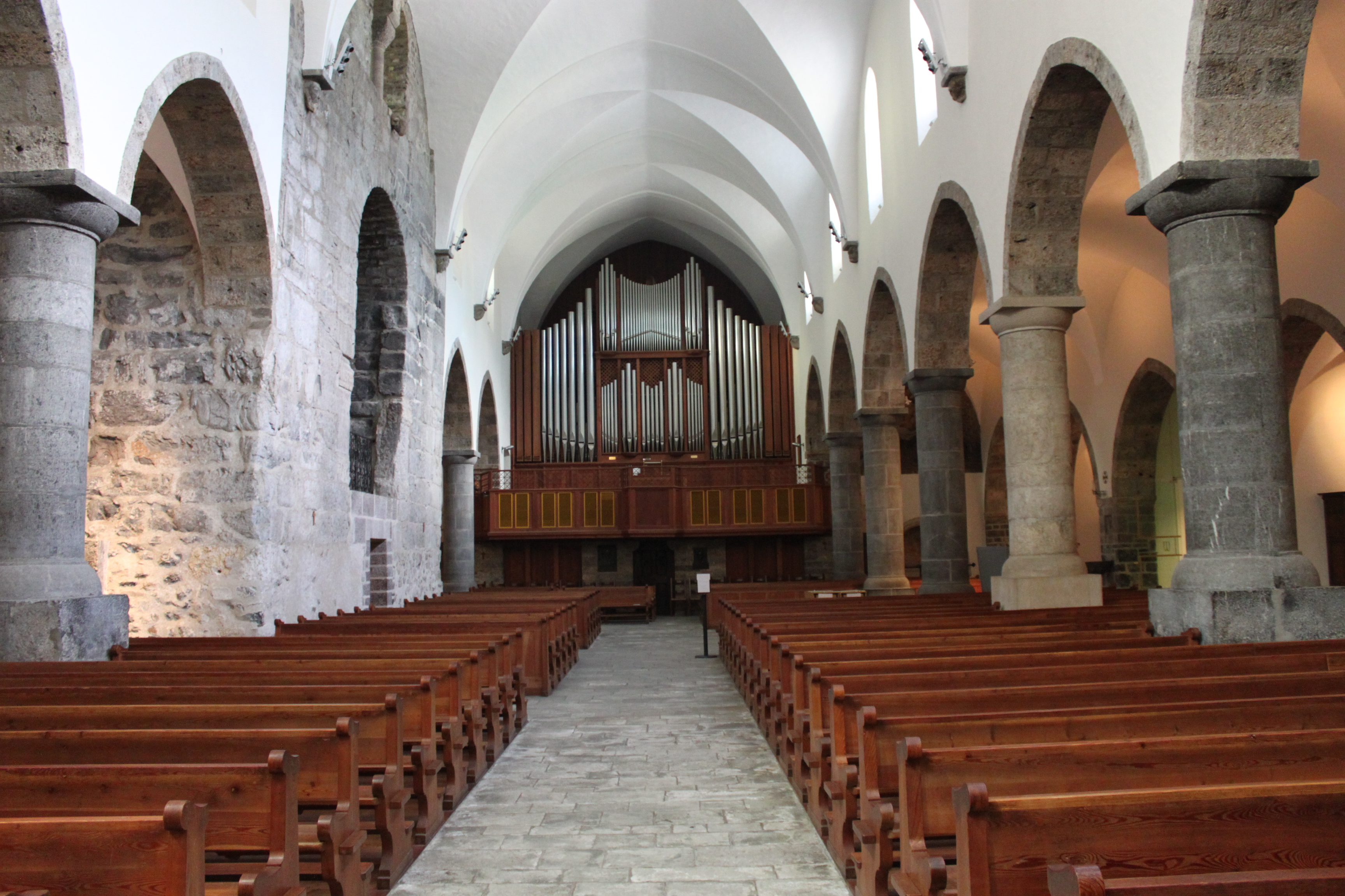 Abbaye de St-Maurice (Suisse)